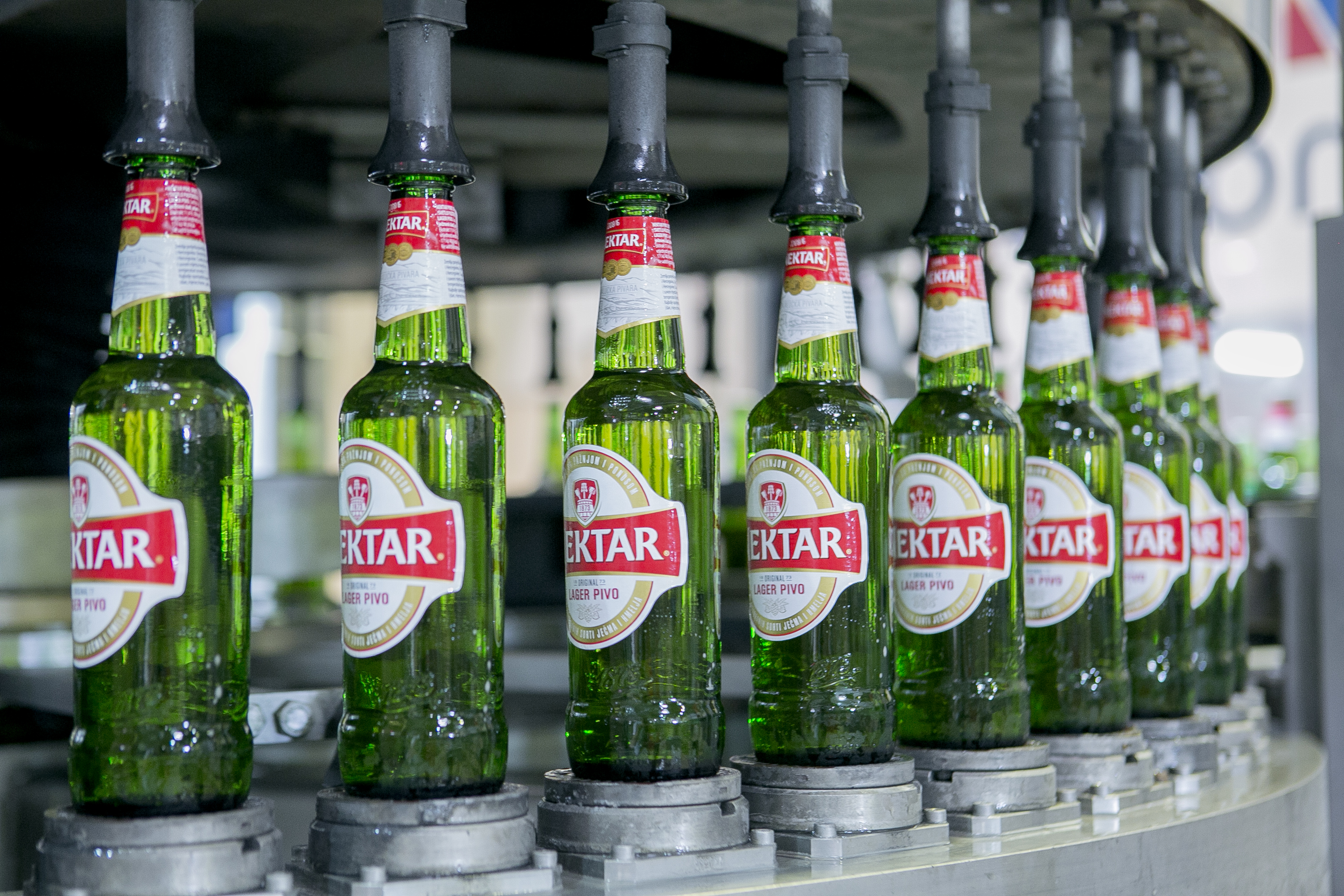 Nektar pivo